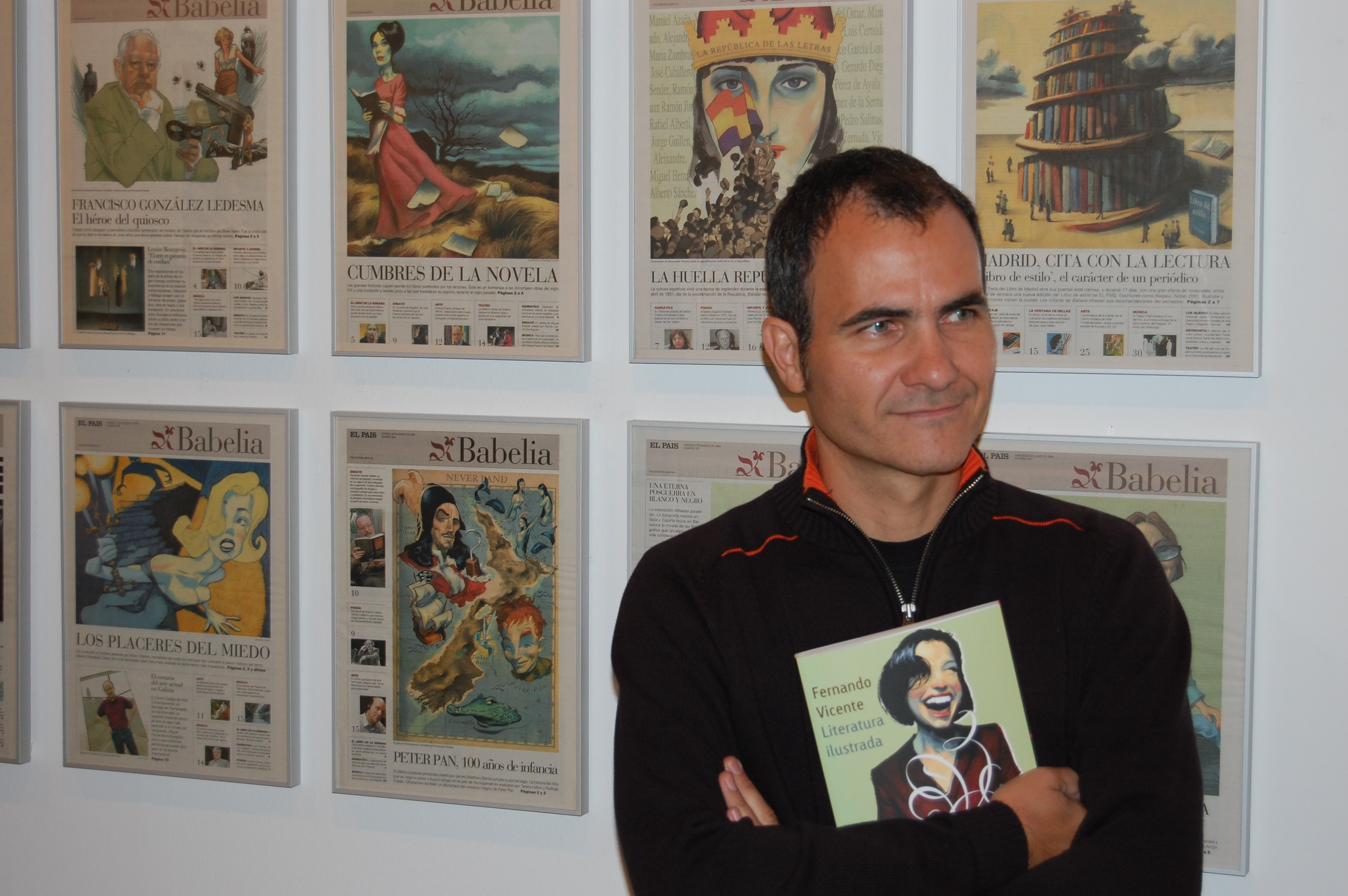 Fernando Vicente en la exposicion "Literatura Ilustrada" en Sevilla 2007